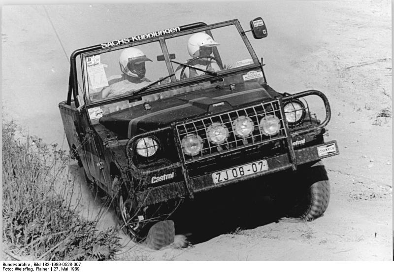 Klettwitz, 2. Geländewagen-Rallye, Teilnehmer ADN-ZB Weisflog -27.5.89 Cottbus: Moto-Cross-Auf der Moto-Cross-Strecke am Sonnenhäusel in Klettwitz fand am Wochenende die 2. Geländewagen-Ralley 4 x 4 „Durch das Lausitzer Land“ statt. Bei der vom MC BKK Senftenberg organisierten Ausscheidung konnte sich der 20jährige Oliver Hohte aus Ruhland mit seinem Beifahrer nach vorn plazieren. Information added by Wikimedia users.IFA P3